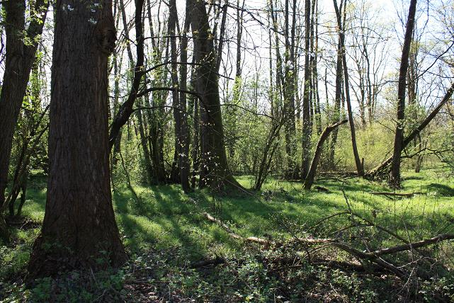 SIC Boschi del Vignolo, ZPS Boschi del Ticino, Italy, Garlasco, Parco Lombardo della Valle del Ticino